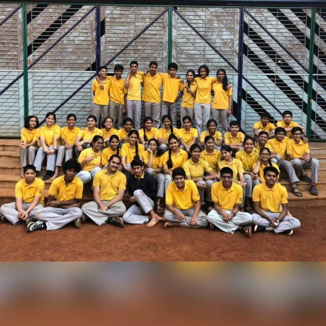 अक्षरनंदन २०१८